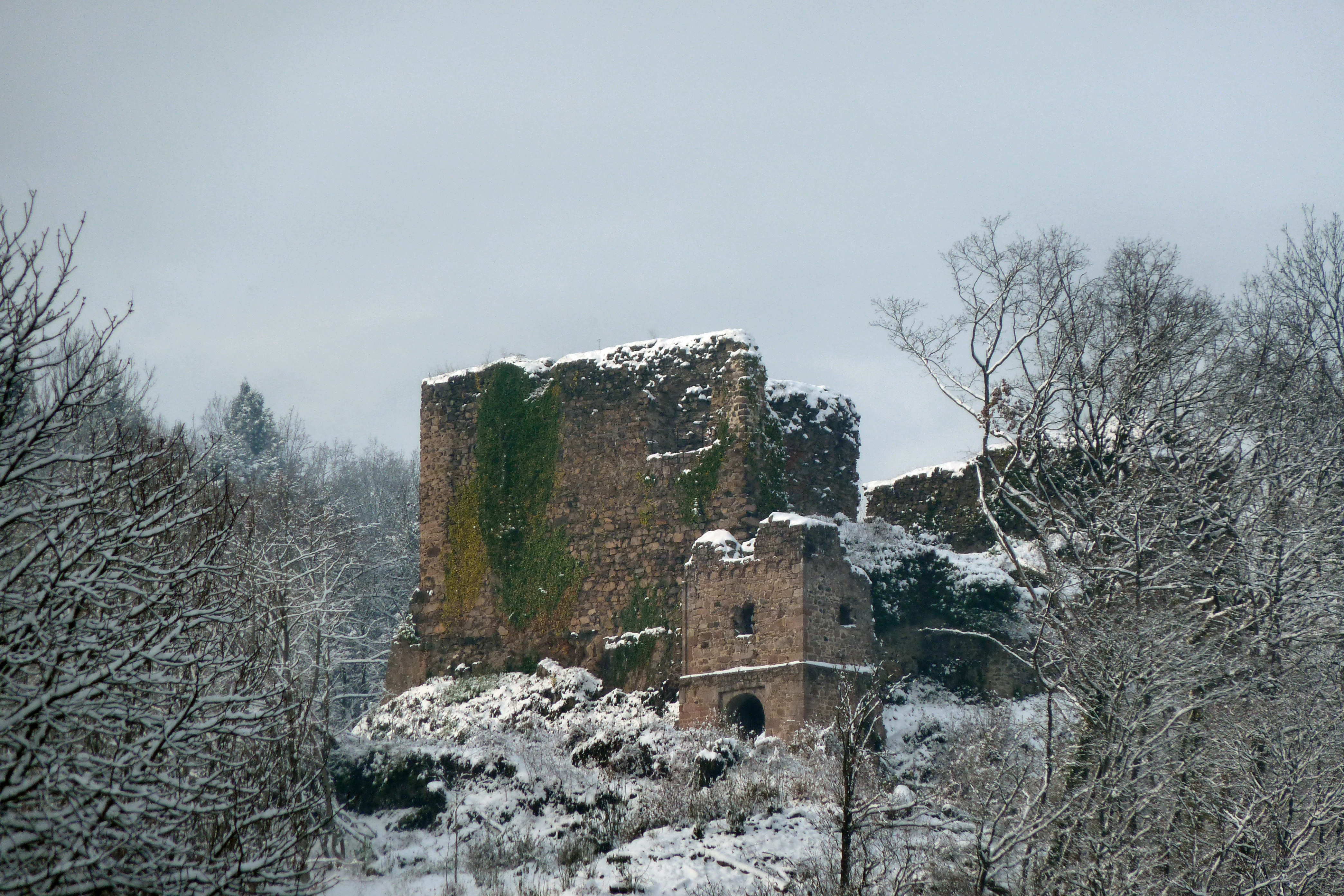 Ruine Hugstein bei Guebwiller im Elsass